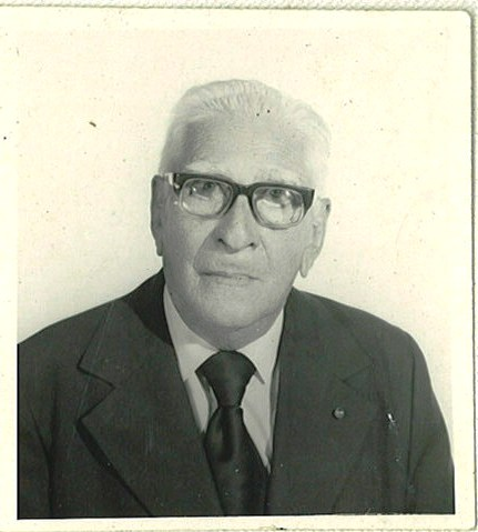 Octogenario